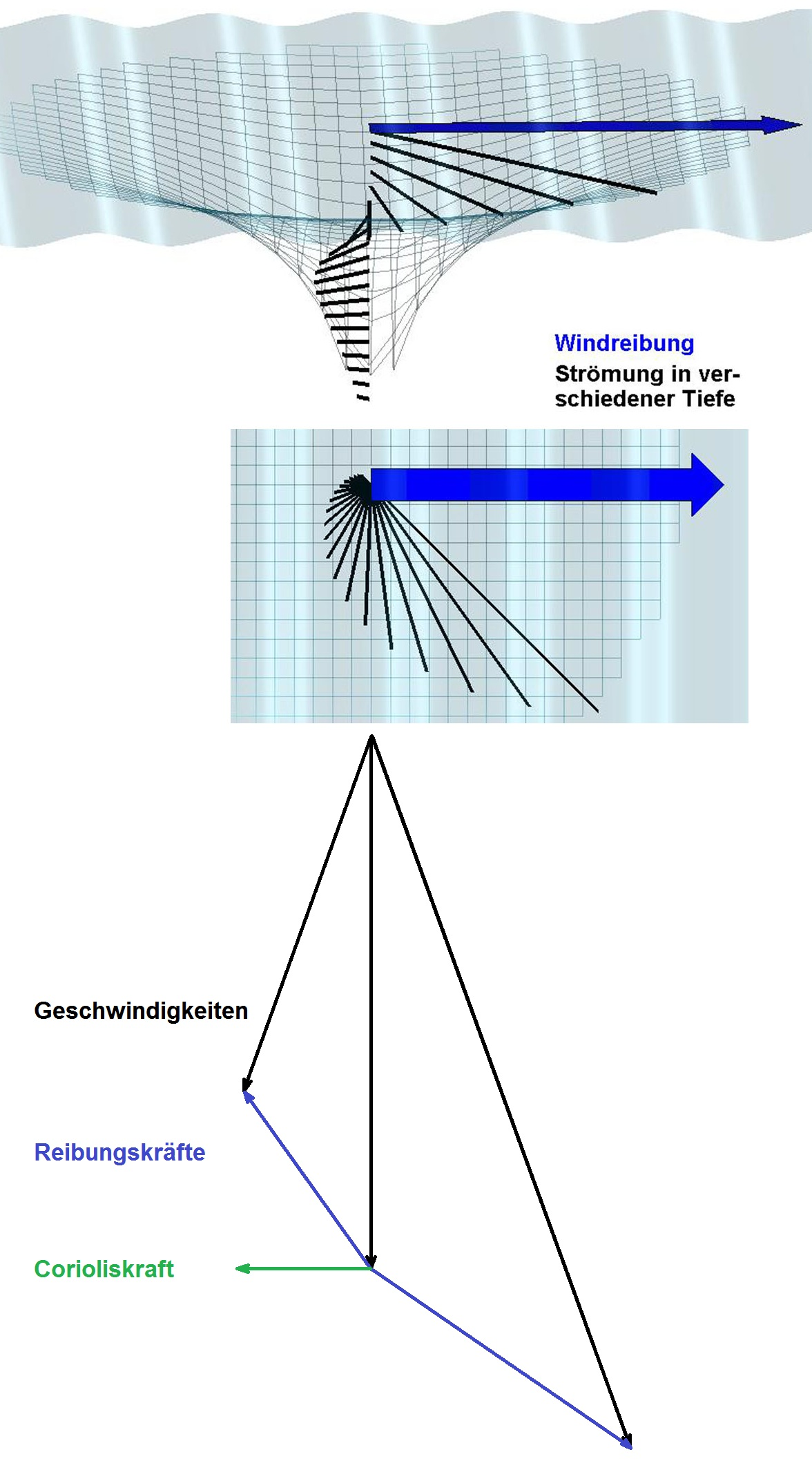 Oben: Ekman-Spirale in perspektivischer Ansicht, Windstress (blau), tiefenabhängige Strömung (schwarz). Mitte: Draufsicht. Die mittlere Strömung (integriert bis in große Tiefe) ist quer zum Wind gerichtet (auf der Nordhemisphäre nach rechts). Unten: Kräftediagramm für eine Schicht zwischen zwei anderen. Die Geschwindigkeiten (schwarz) unterscheiden sich jeweils in der Richtung um 20°, im Betrag um etwa einen Faktor 1,42. Die Reibungskräfte (blau) sind proportional zu den Geschwindigkeitsdifferenzen. Die Corioliskraft wirkt quer zur Geschwindigkeit. Die Summe der Kräfte ist null (Gleichgewicht).